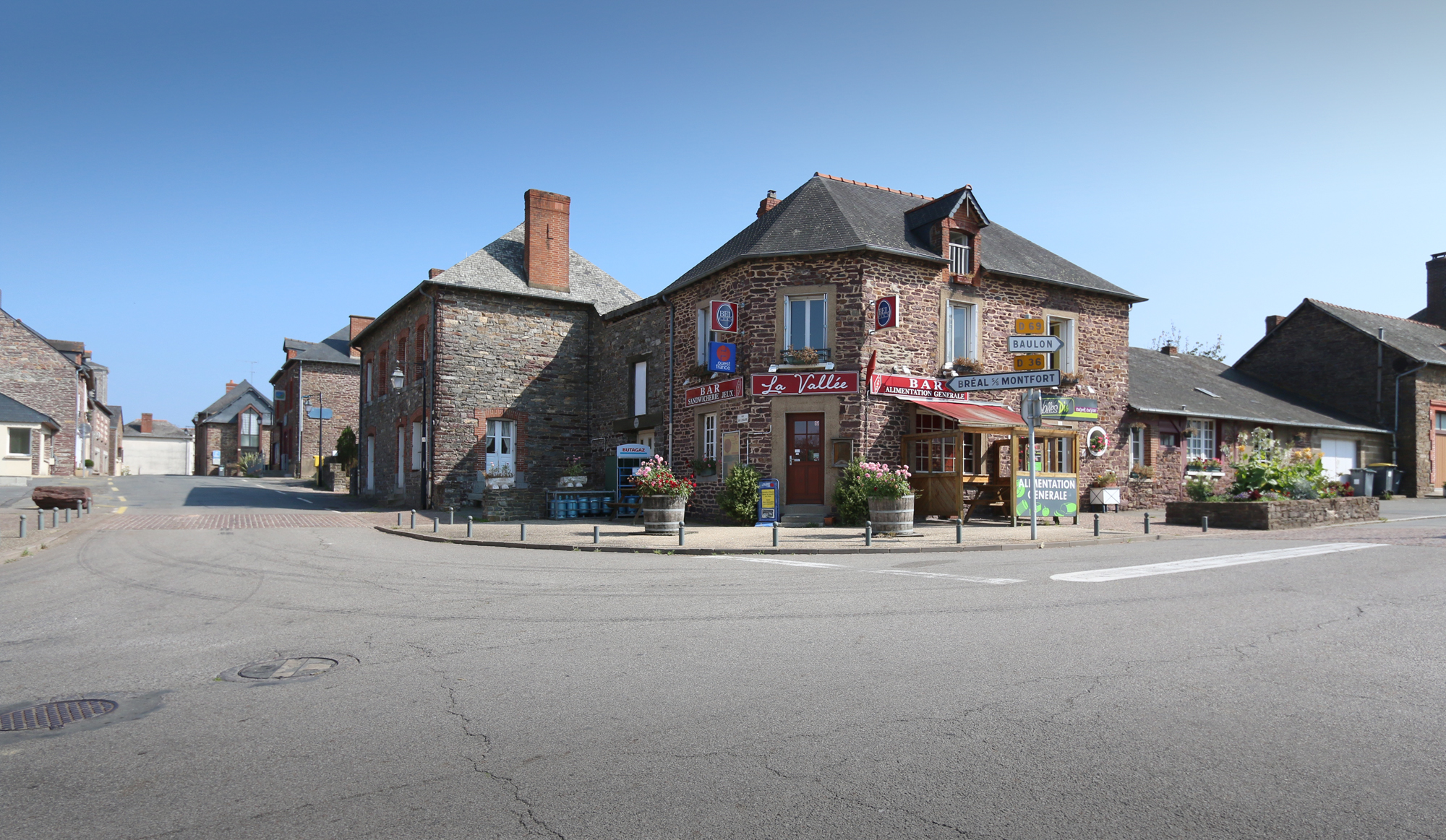 Ville de Saint-Thurial .